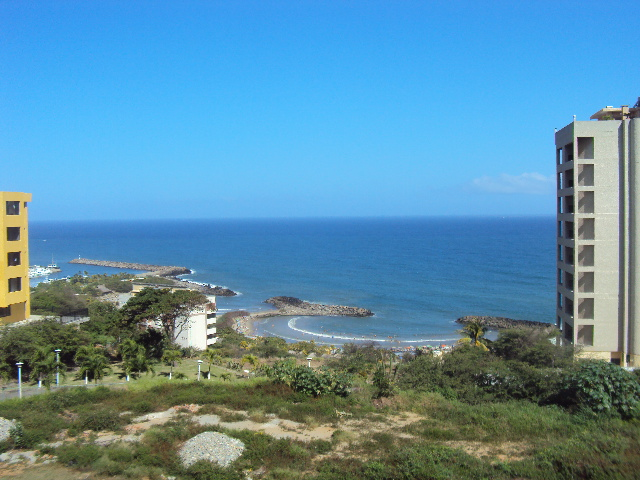 A lo lejos se observan edificaciones y una playa en Catia La Mar, edo. Vargas.